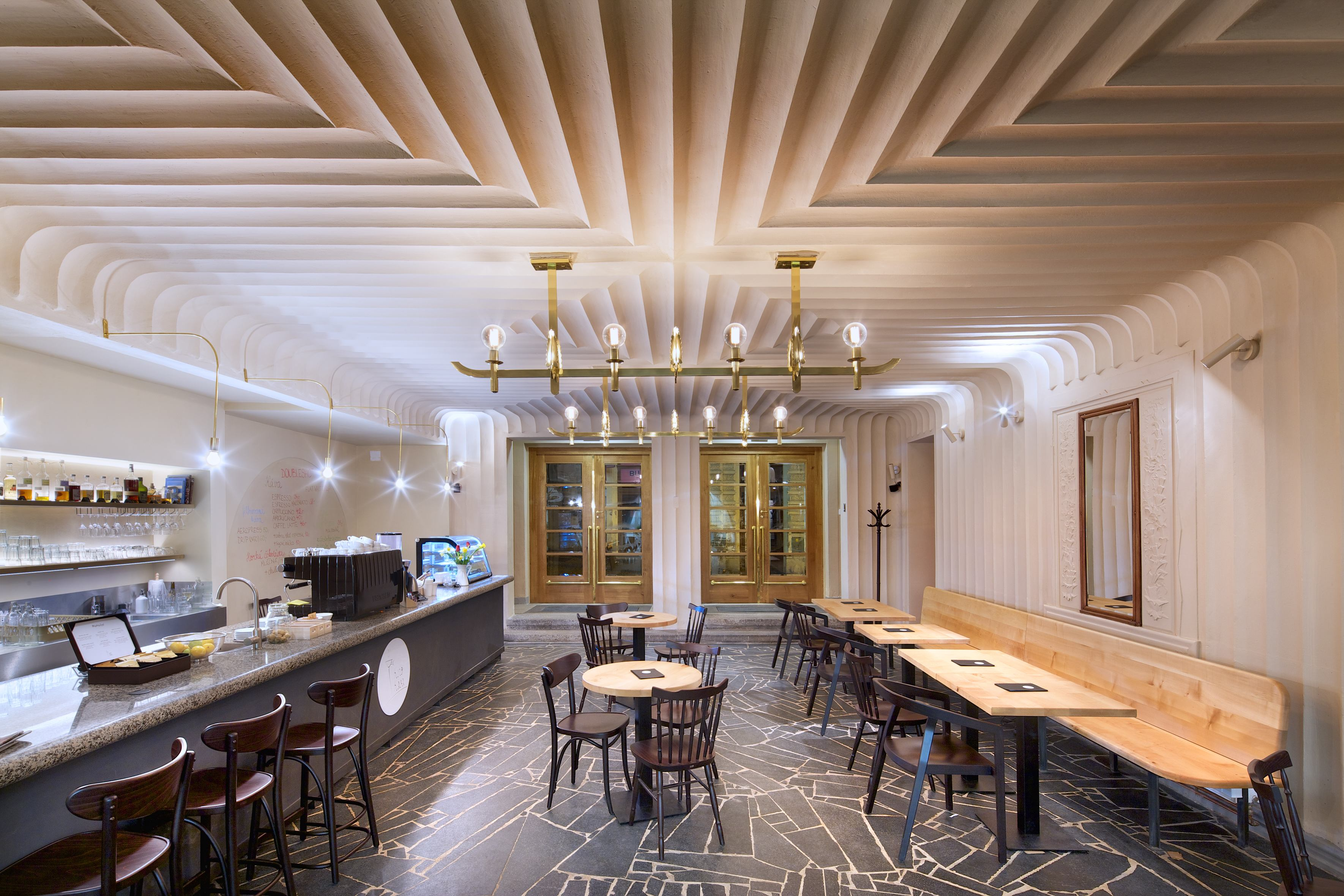 foyer Kina Varšava 2015 (foto Aleš Jungmann)